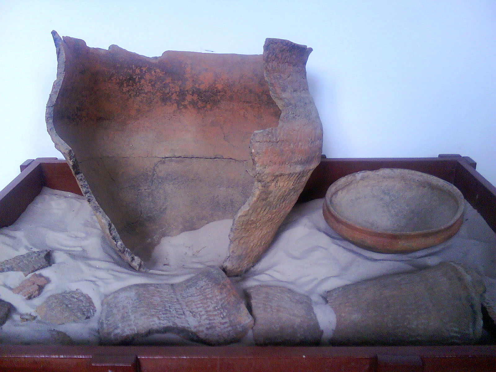 Fotografia de peças de cerâmica encontradas em um sambaqui do litoral de Jaguaruna.